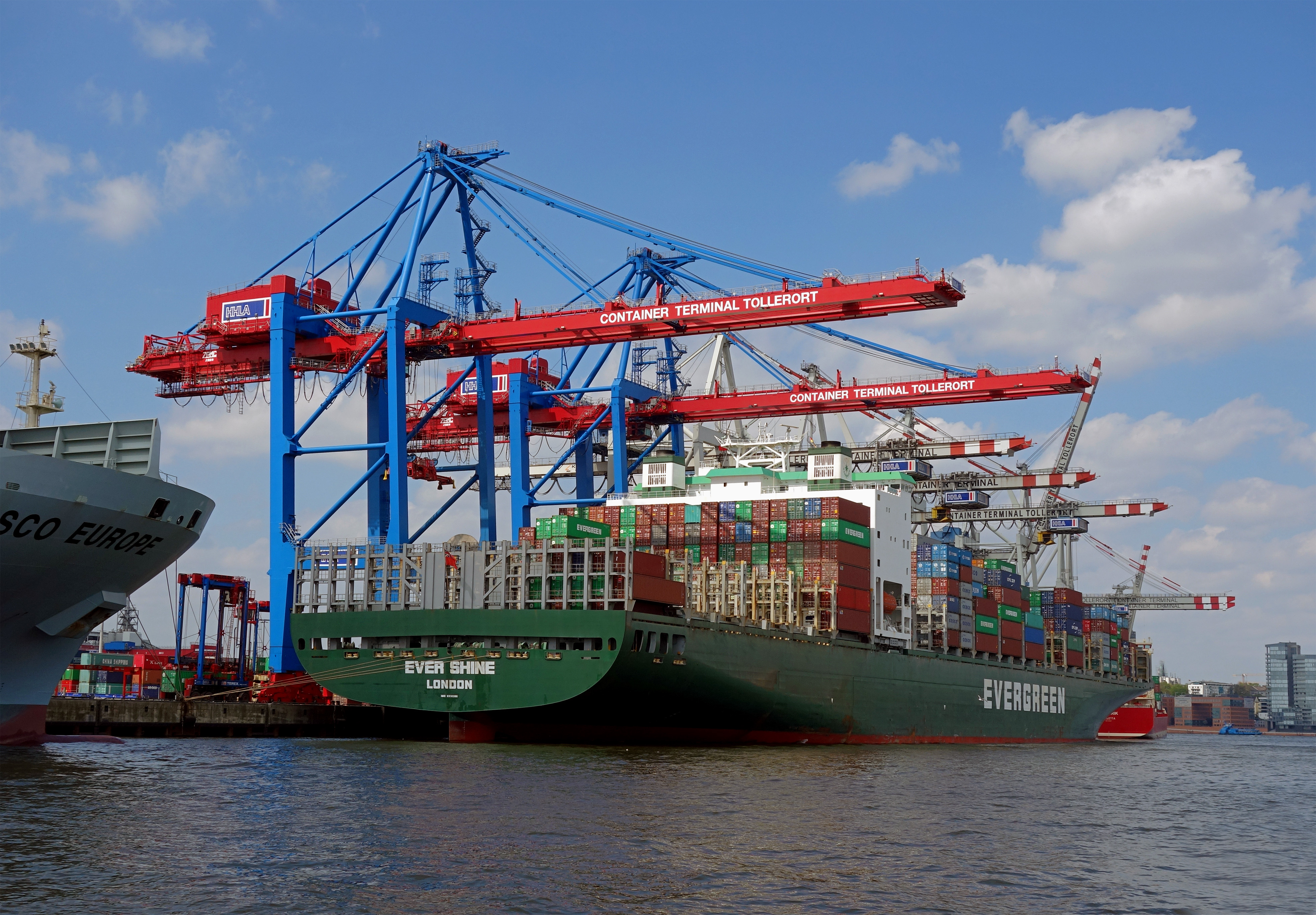 Die Ever Shine im Hamburger Hafen. Die Ever Shine ist ein Containerschiff der Evergreen Marine. Das Schiff kann über 7.000 ISO-Container transportieren und wurde 2005 als erstes Schiff der Evergreen S-Klasse in Betrieb genommen.